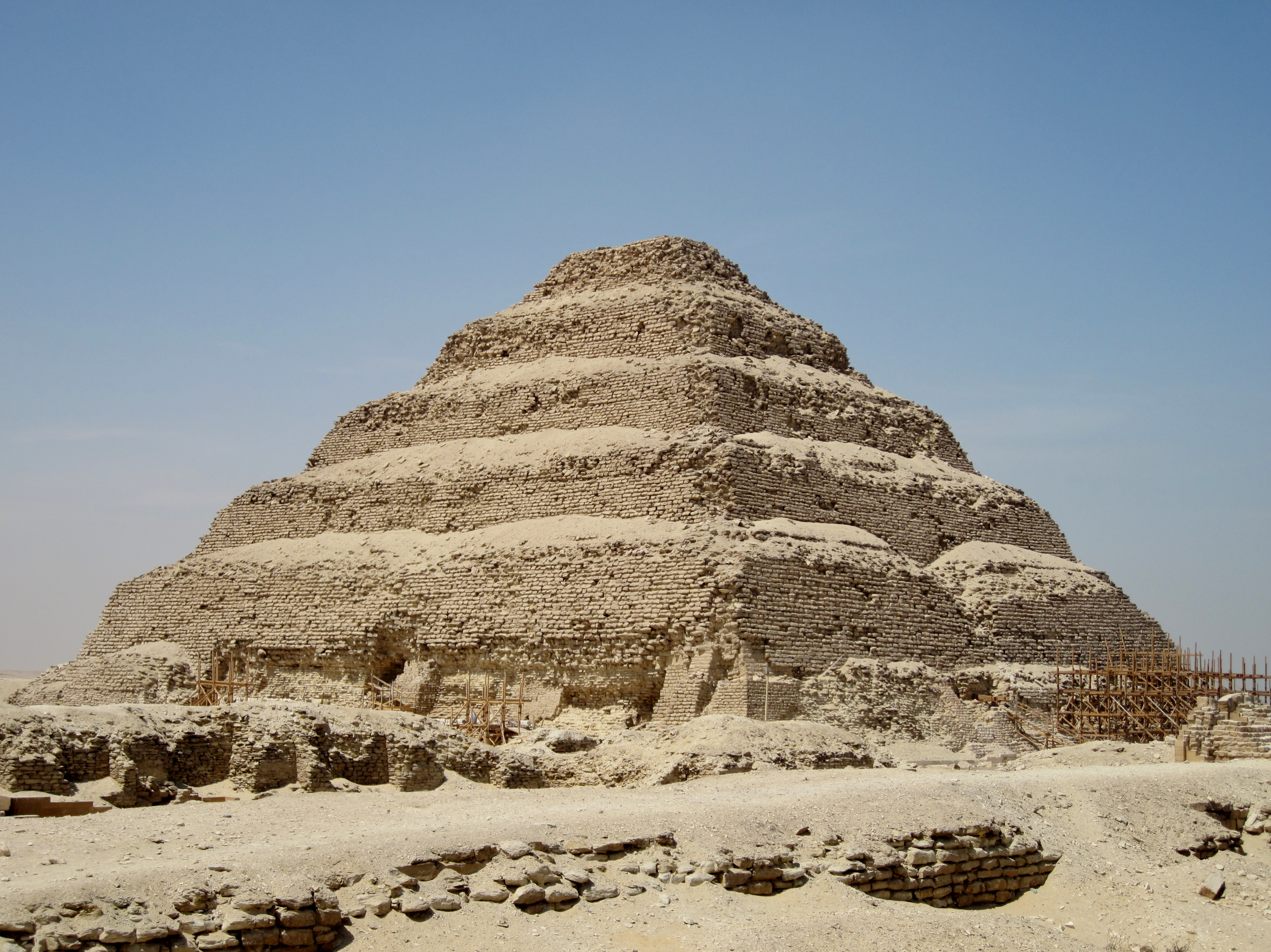 Stufenpyramide des Pharao Djoser aus der 3. Dynastie des Alten Reiches in Ägypten (um 2670 v. Chr.)